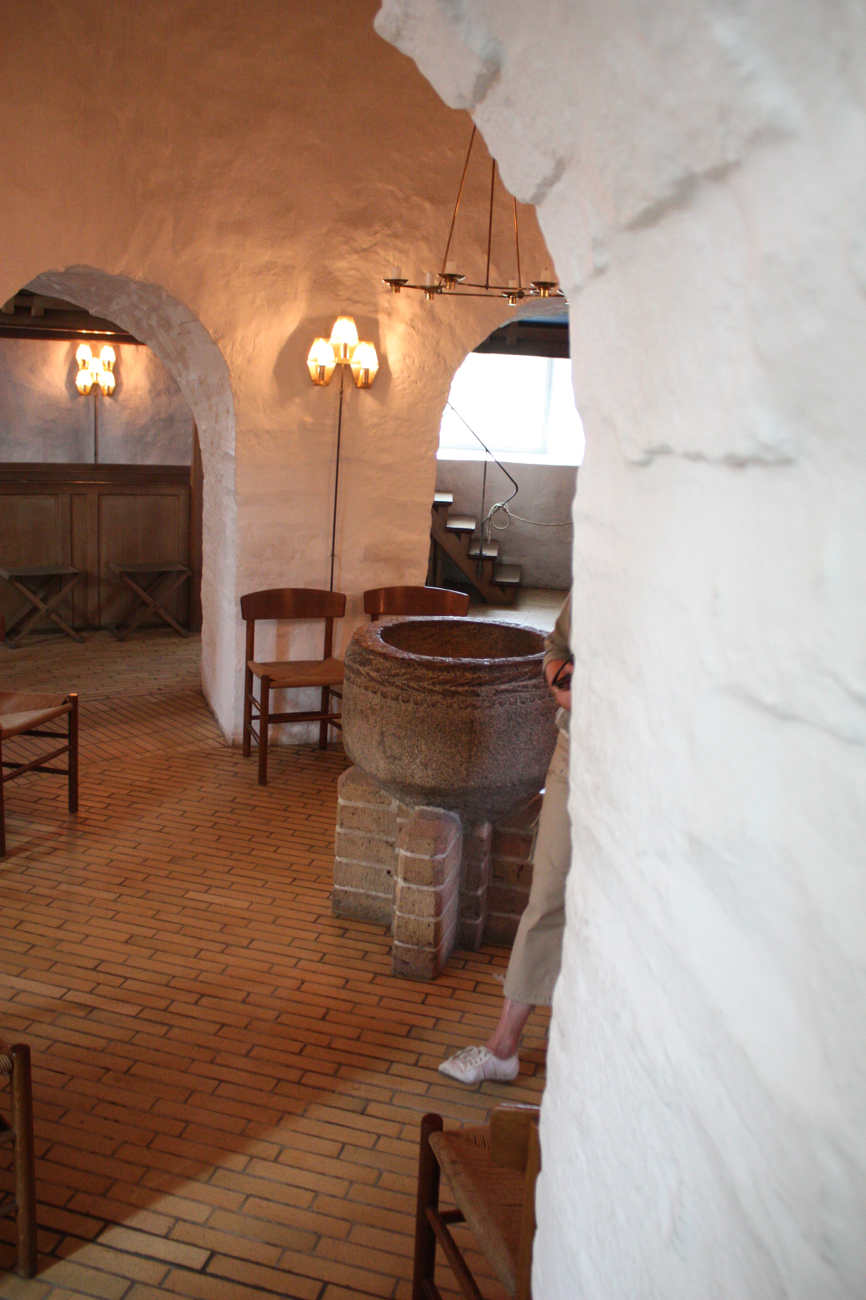 Østerlars kirke , Bornholm, August 2009